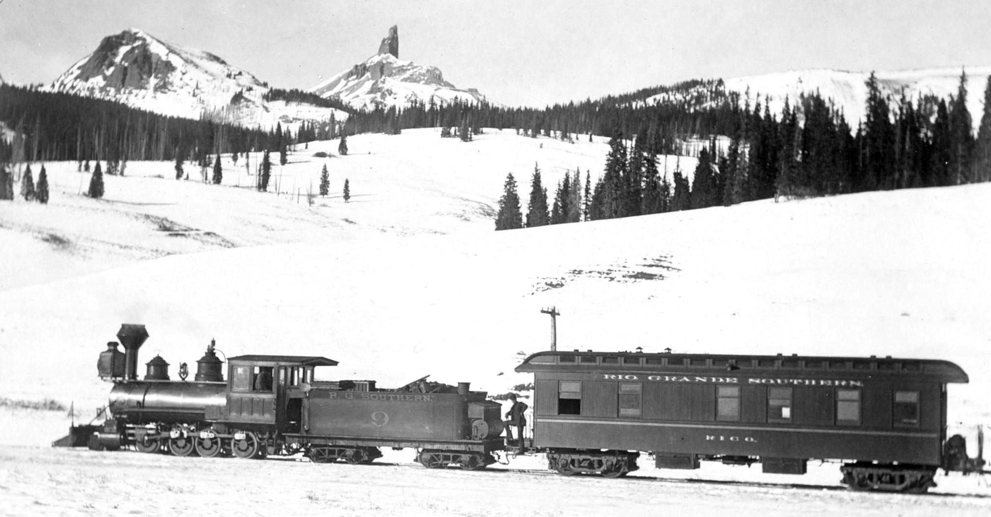 IdentificatieTitel(s): Trein van Rio Grande Southern in besneeuwd landschap in de Rocky MountainsObjecttype: foto Objectnummer: RP-F-F01195-POmschrijving: Onderdeel van Fotoalbum van een reis door de Verenigde Staten, Honolulu, Nederlands-Indië, Aden, Zanzibar en Zuidelijk Afrika.VervaardigingVervaardiger: fotograaf: William Henry Jackson (toegeschreven aan)Plaats vervaardiging: Rocky MountainsDatering: ca. 1860 - ca. 1900Fysieke kenmerken: daglichtgelatinezilverdrukMateriaal: karton papier fotopapier Techniek: daglichtgelatinezilverdrukAfmetingen: h 107 mm × b 183 mmOnderwerpWat: mountain-range, snow peaksWaar: Rocky MountainsVerwerving en rechtenVerwerving: overdracht van beheer 1994Copyright: Publiek domein